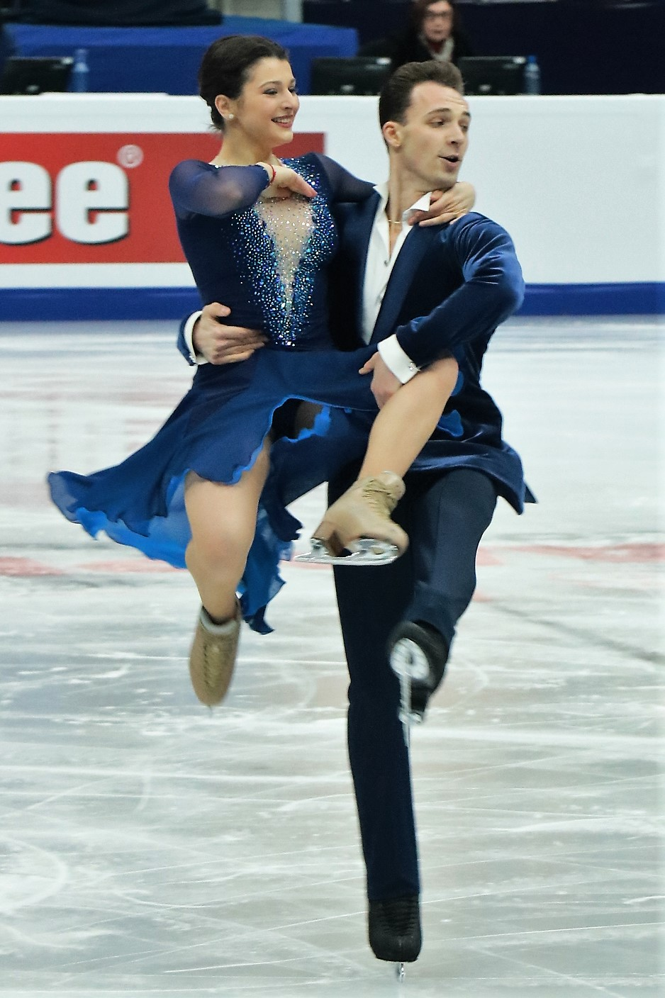 Наталья Калишек / Максим Сподырев (Польша) на Чемпионате Европы по фигурному катанию 2018.